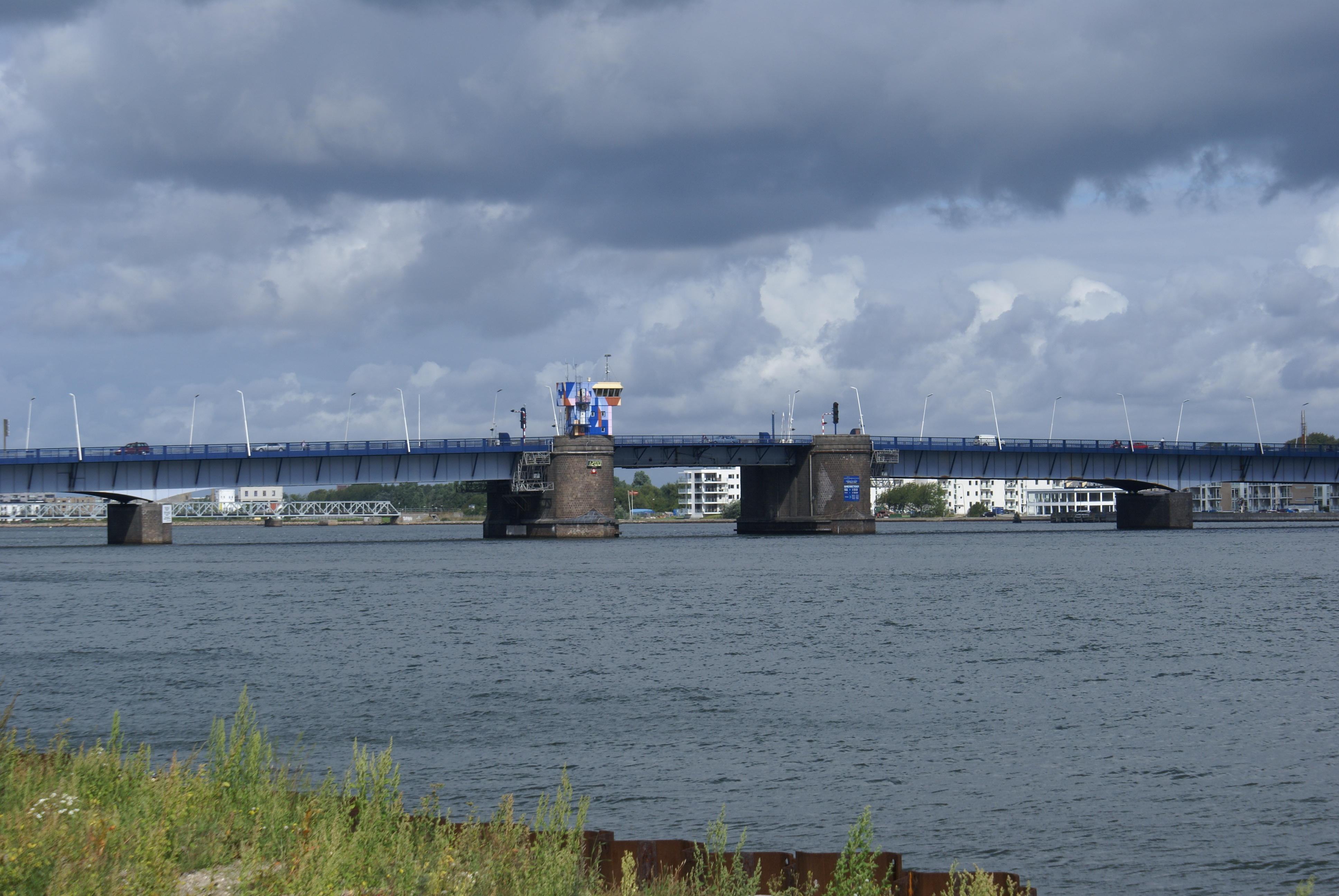 Brücke über den Limfjord in Aalborg